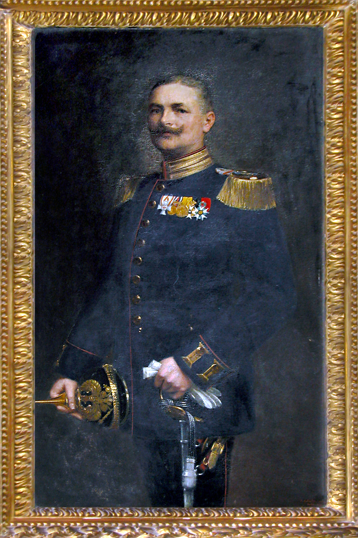 28.10.2009 01445 Radebeul-Zitzschewig: Hohenhaus, Haus Bischofsberg, Barkengasse 6 (GMP 51.121045,13.610670). In der Diele hängt das Ölporträt des Herrn Dr. Walther Stechow (geb. 25.01.1852 in Jarchlin, Landkreis Neugard im ehem. Bezirk Stettin; verst. 17.12.1927 in Frankfurt/Main), Obergeneralarzt und Leiter des deutschen Sanitätswesens. Ab 1885 lebte Walther Stechow im Hohenhaus, das er umfänglich erweiterte. [DSCN39651.TIF]20091028160DR.JPG(c)Blobelt